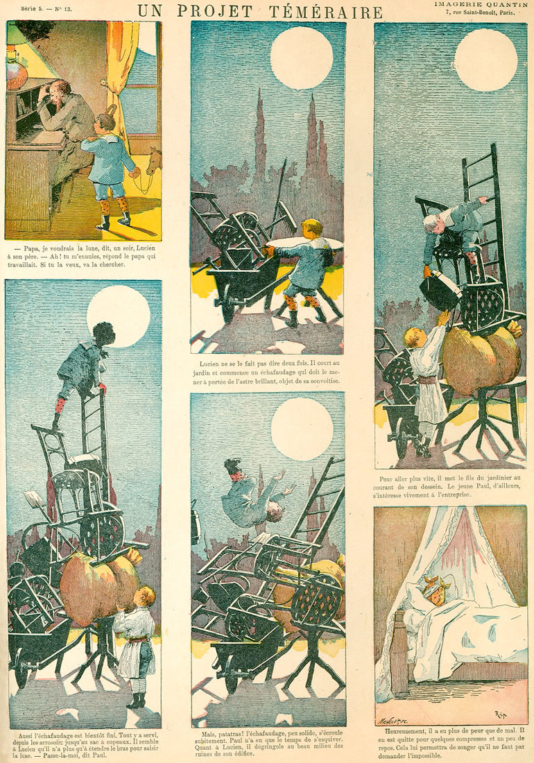 Rip, « Un projet téméraire », Imagerie artistique de la maison Quantin, série 5, planche n° 13, 1888